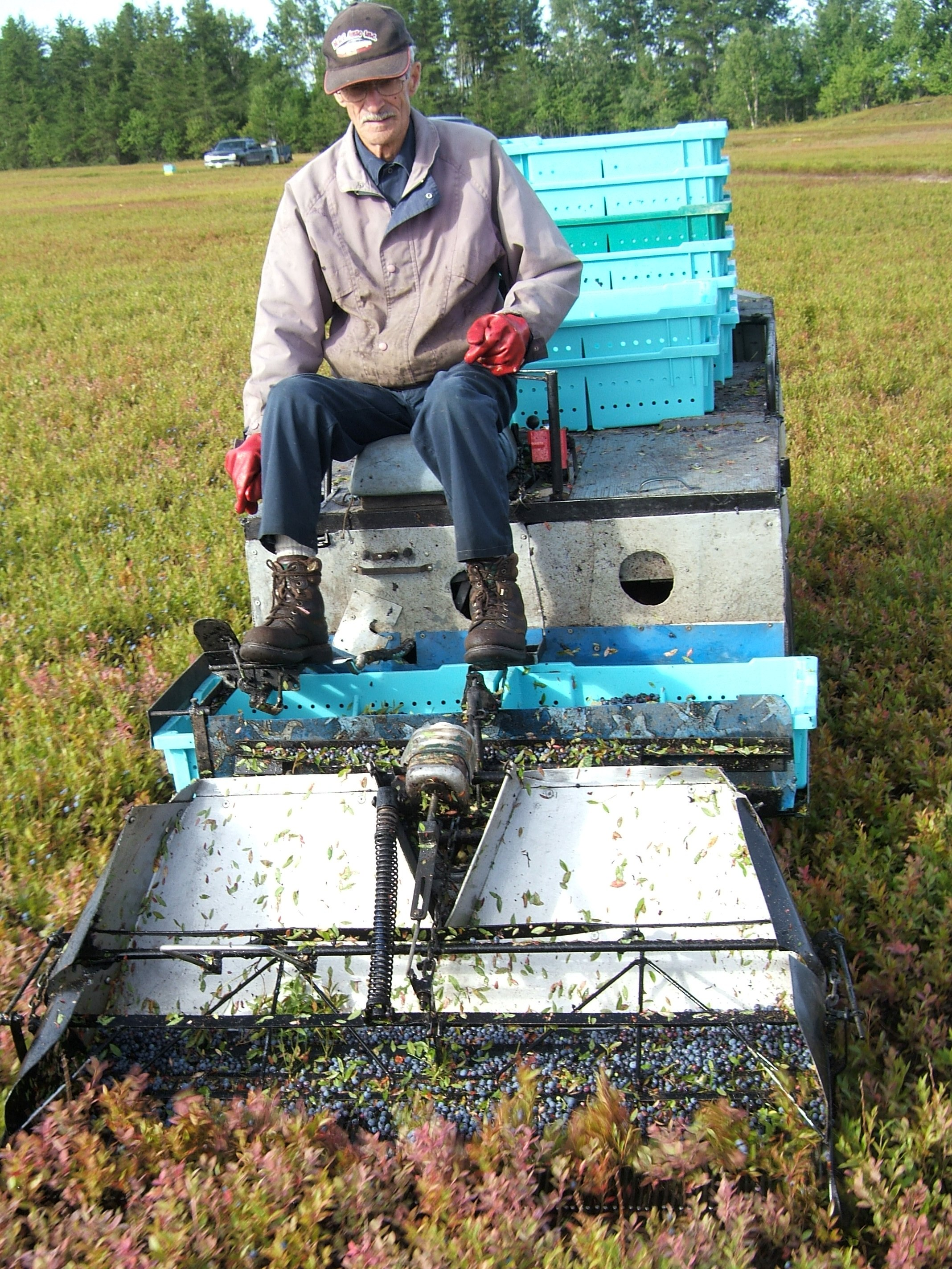 M. Girard à la cueillette de bleuets en 2007